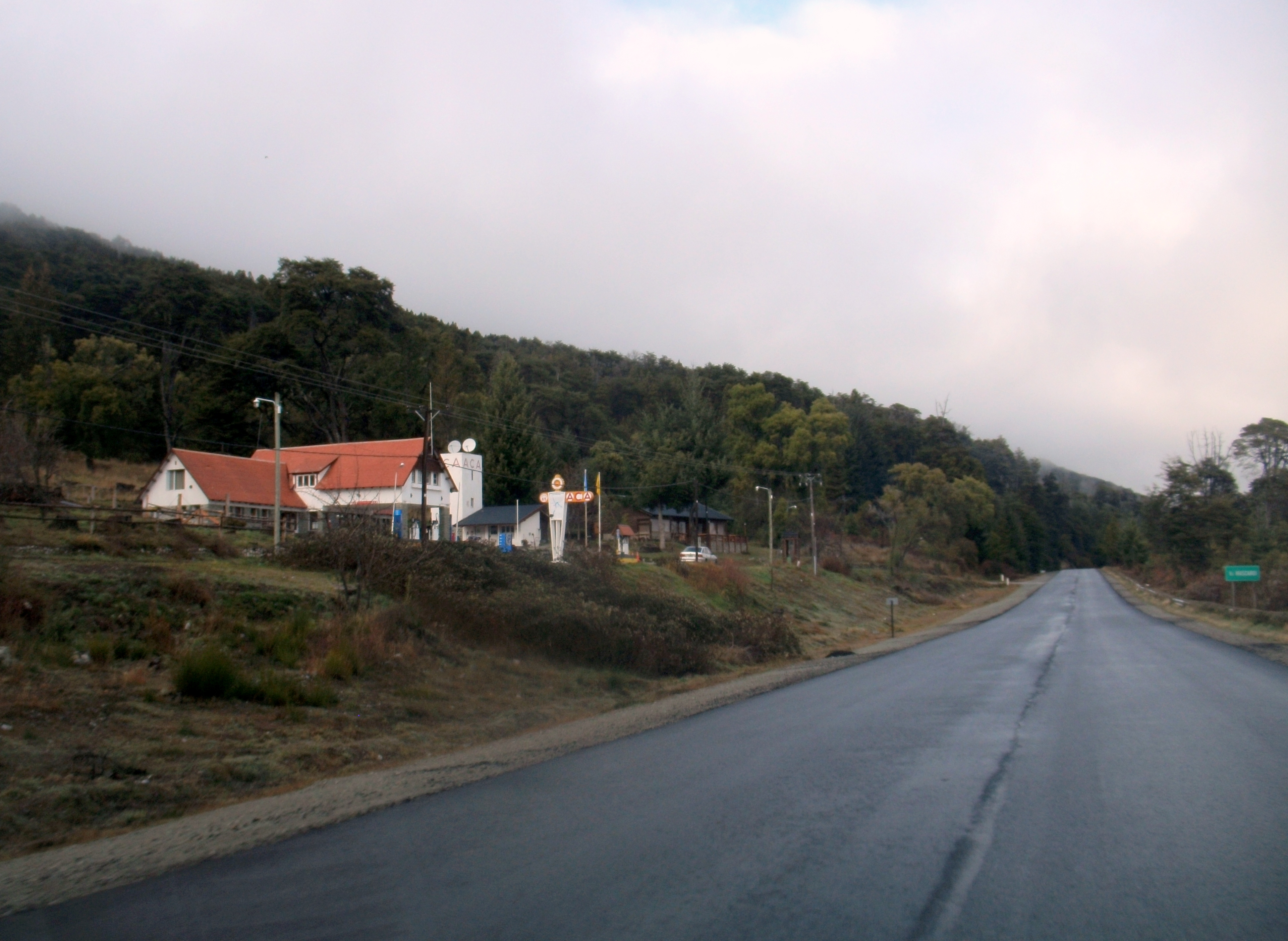 Estación ACA sobre la ruta